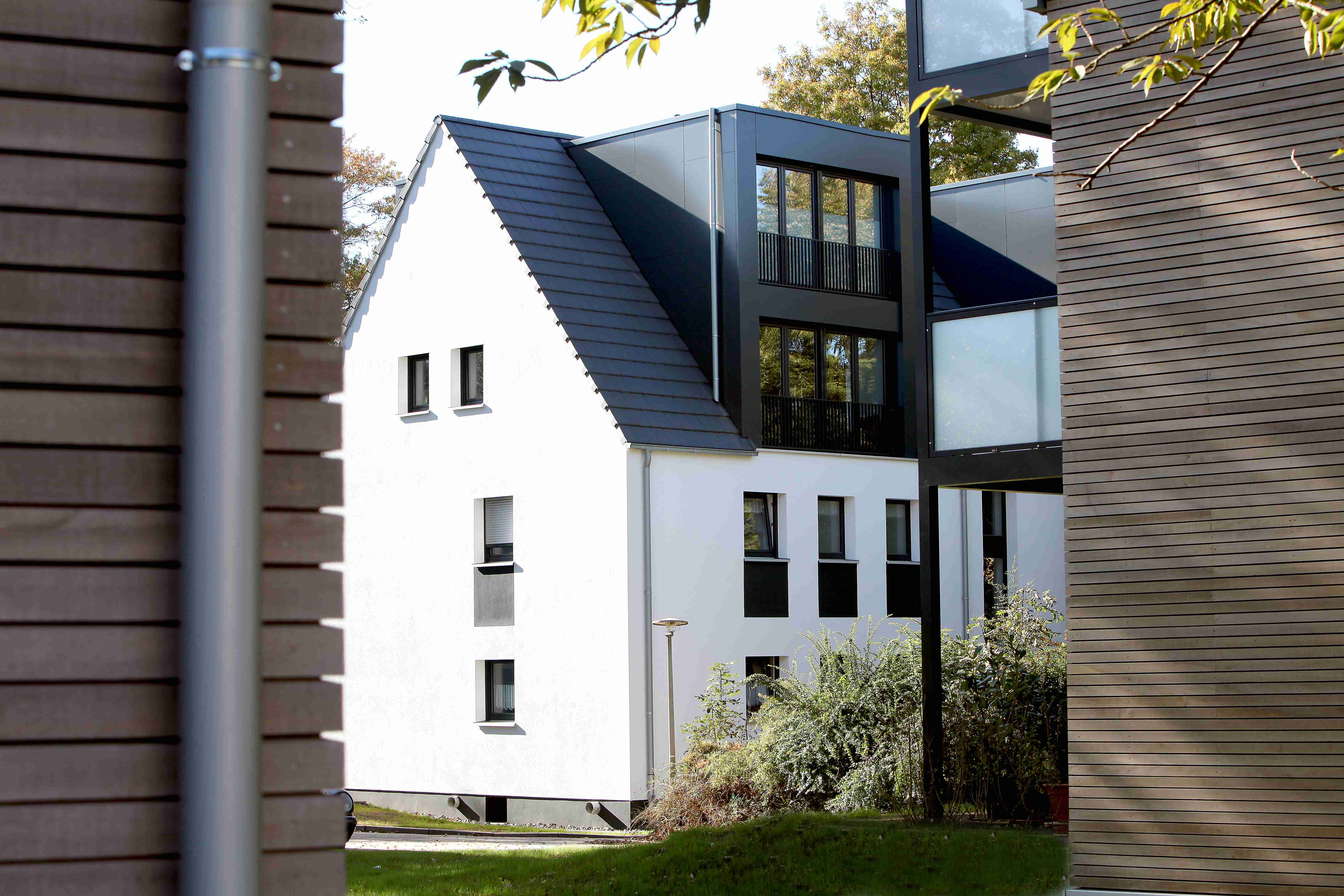 Gebäude der hwg